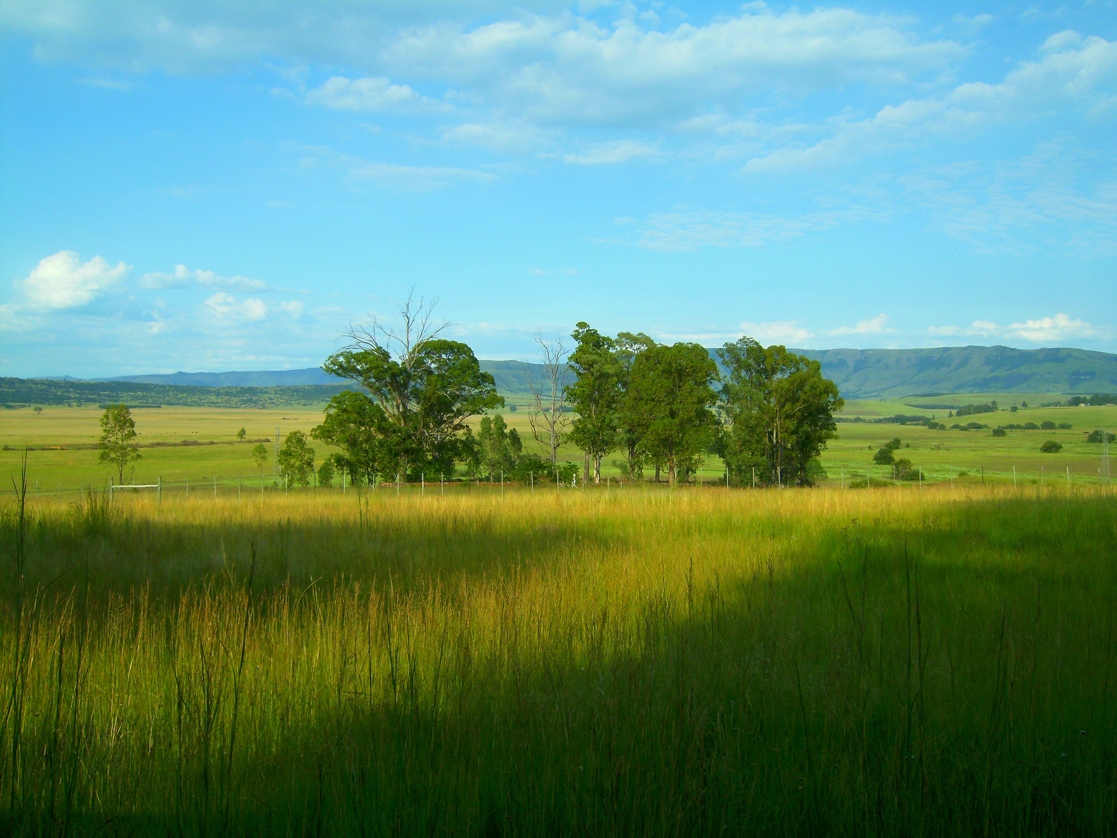 Landskap rondom Newcastle met Drakensberge in die agetgrond , Noord-Wes KZN, Newcastle.